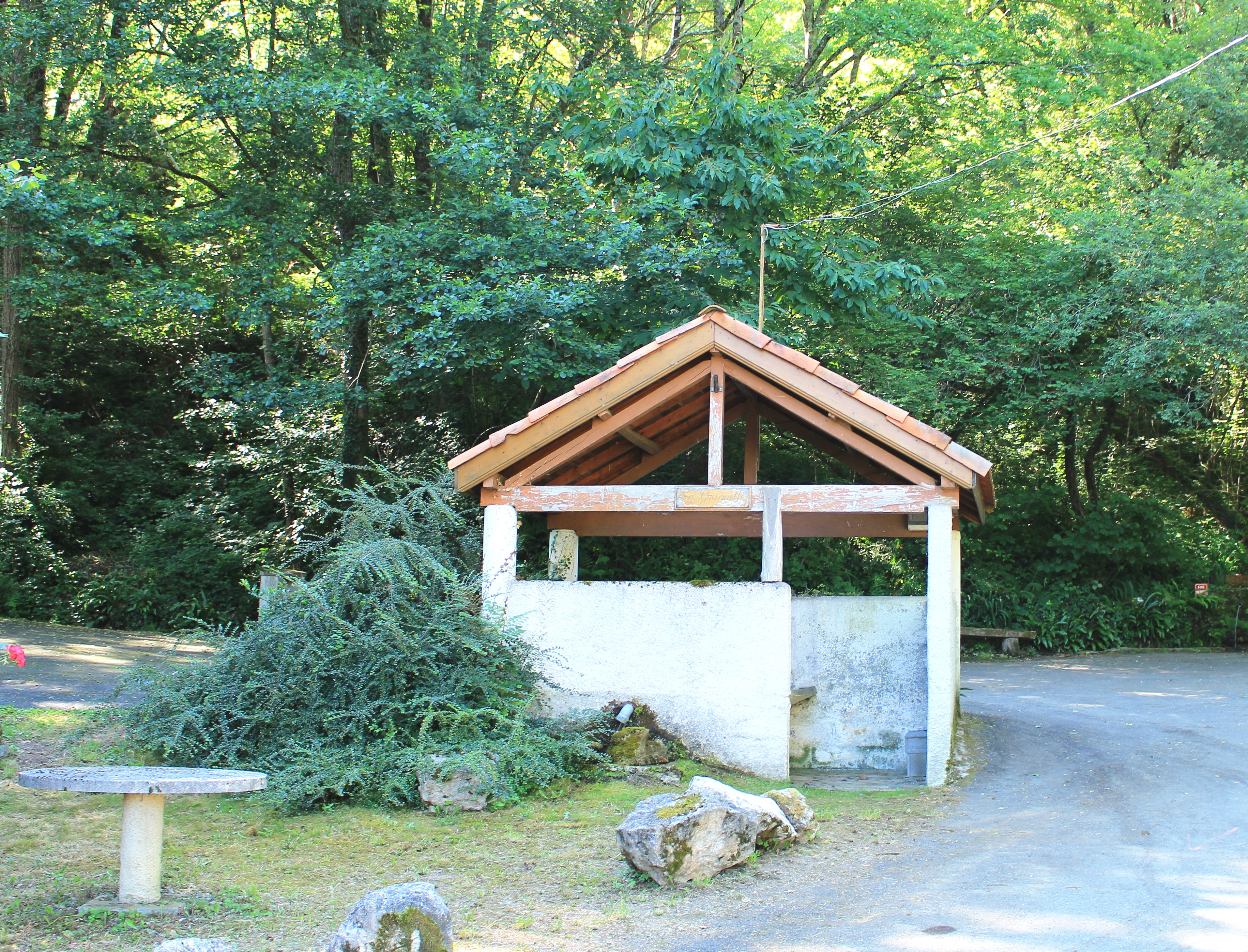 Lavoir de Houeydets (Hautes-Pyrénées)